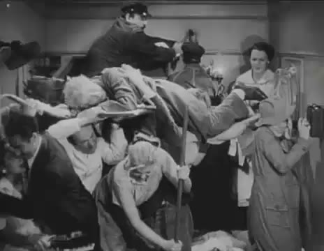 Imatges extretes del Tràiler de la pel·lícula Una nit a l'òpera dels Germans Marx.